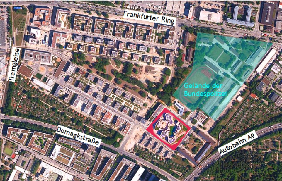 Die ursprüngliche Luftaufnahme des Domagkparks wurde um eine rote Markierung des Wohnbauprojekts wagnisART ergänzt.